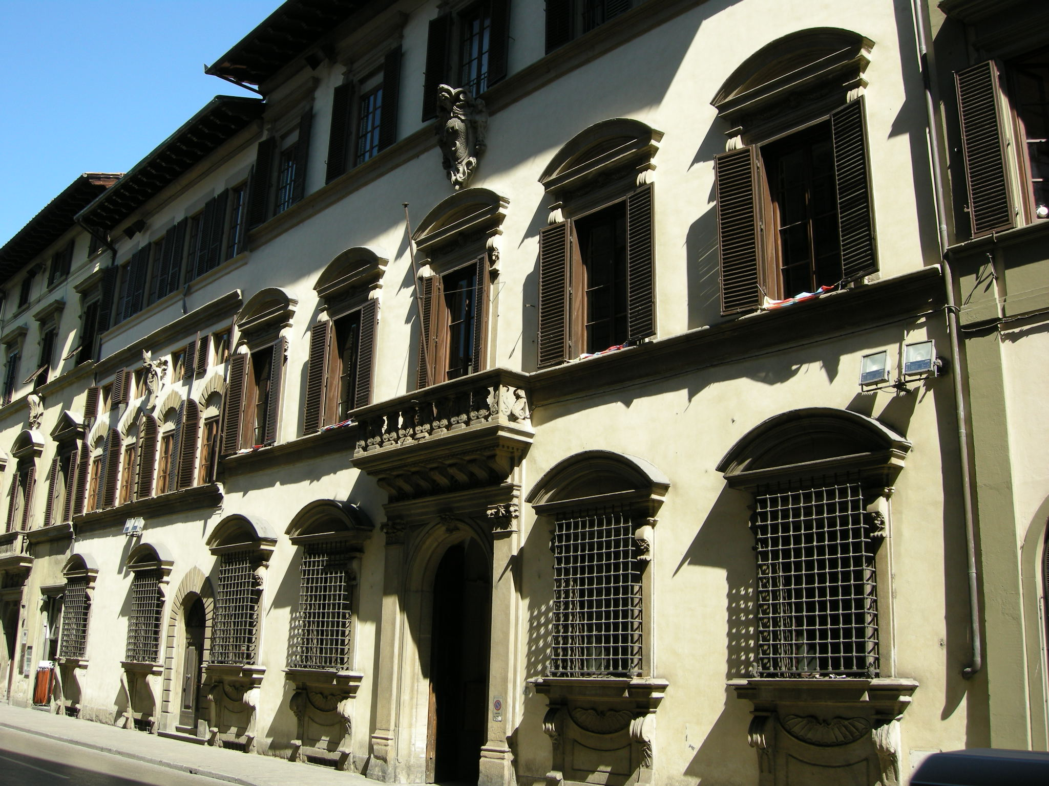 Palazzo Capponi-Covoni